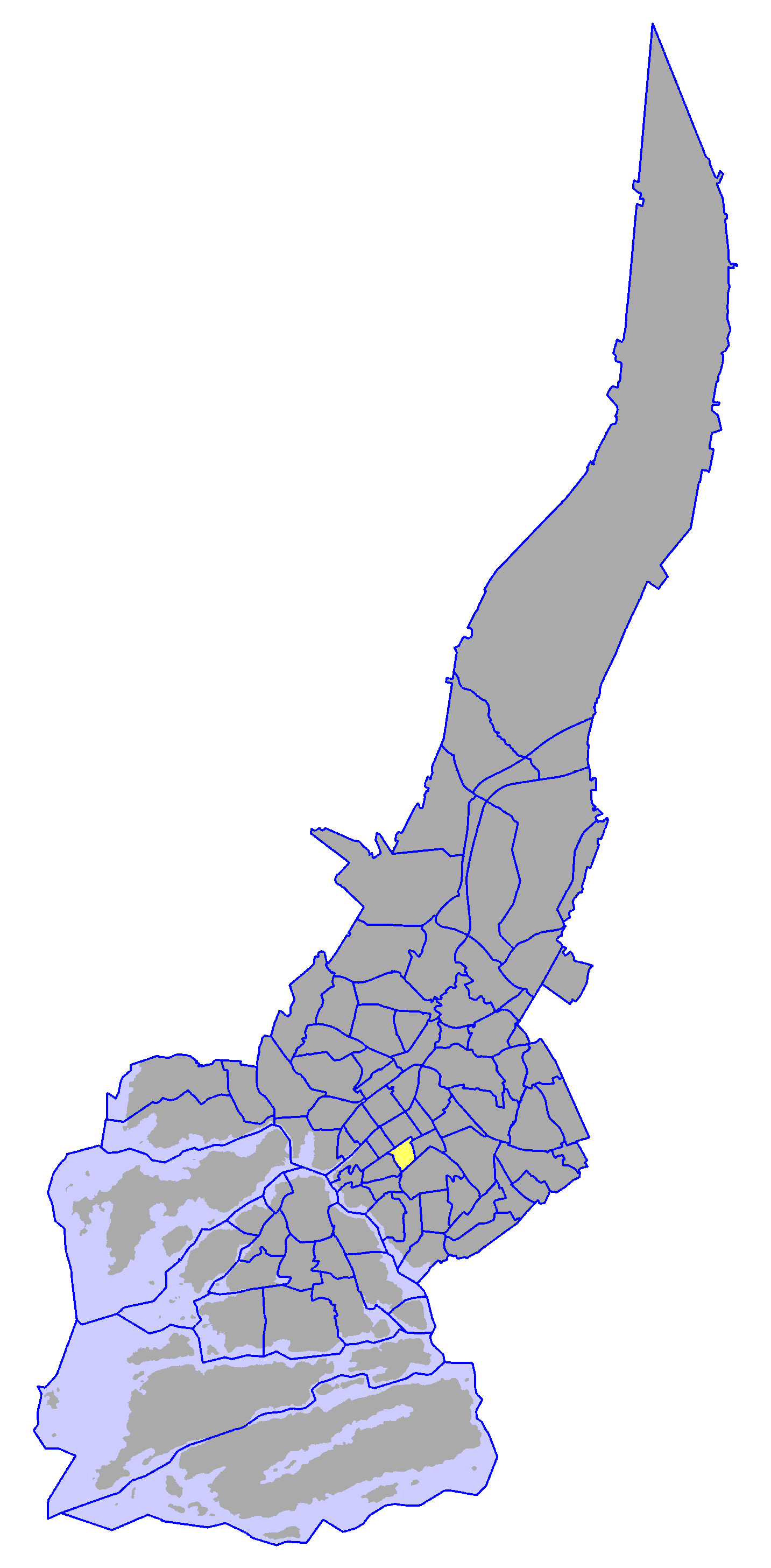 District of Mäntymäki, in Turku